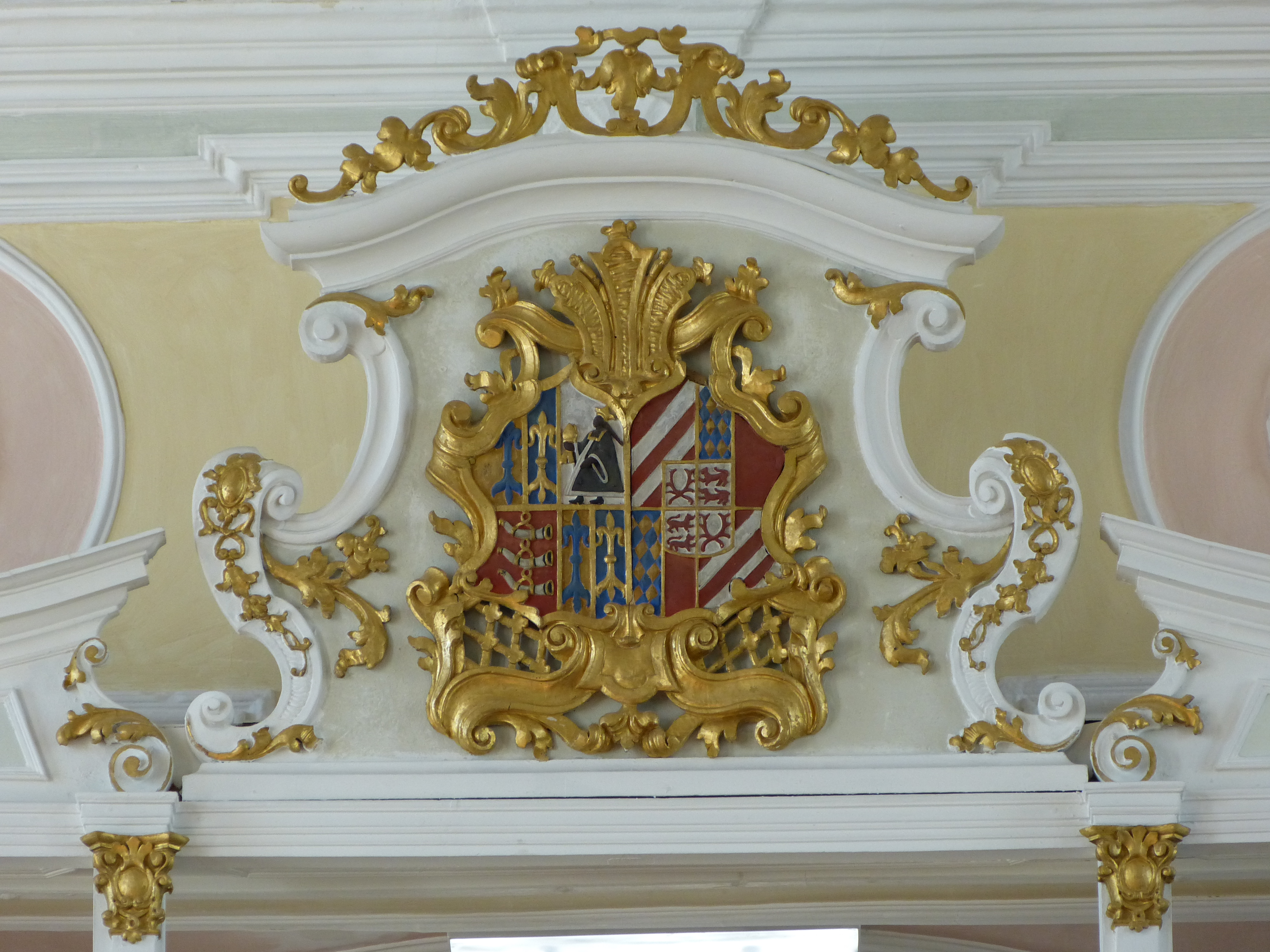 St. Martin in Boos, Landkreis Unterallgäu, Bayern